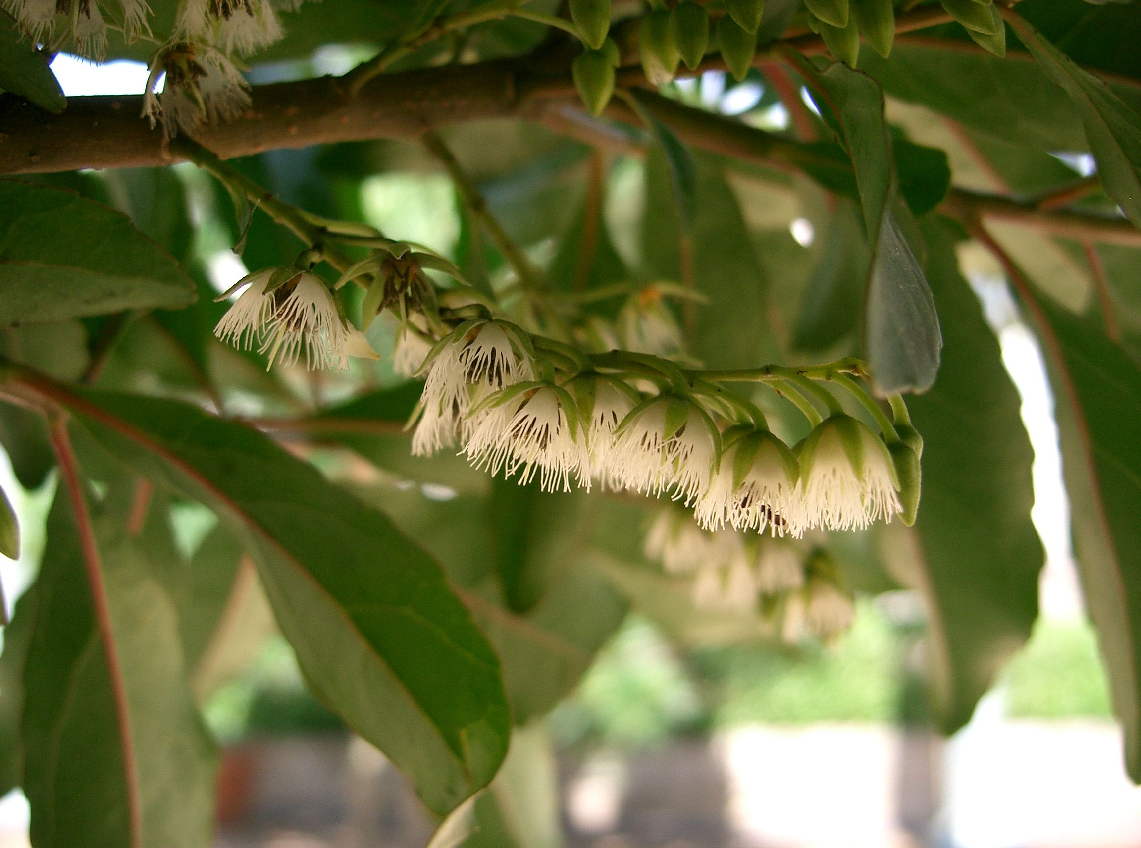 Elaeocarpus sylvestris var. ellipticus